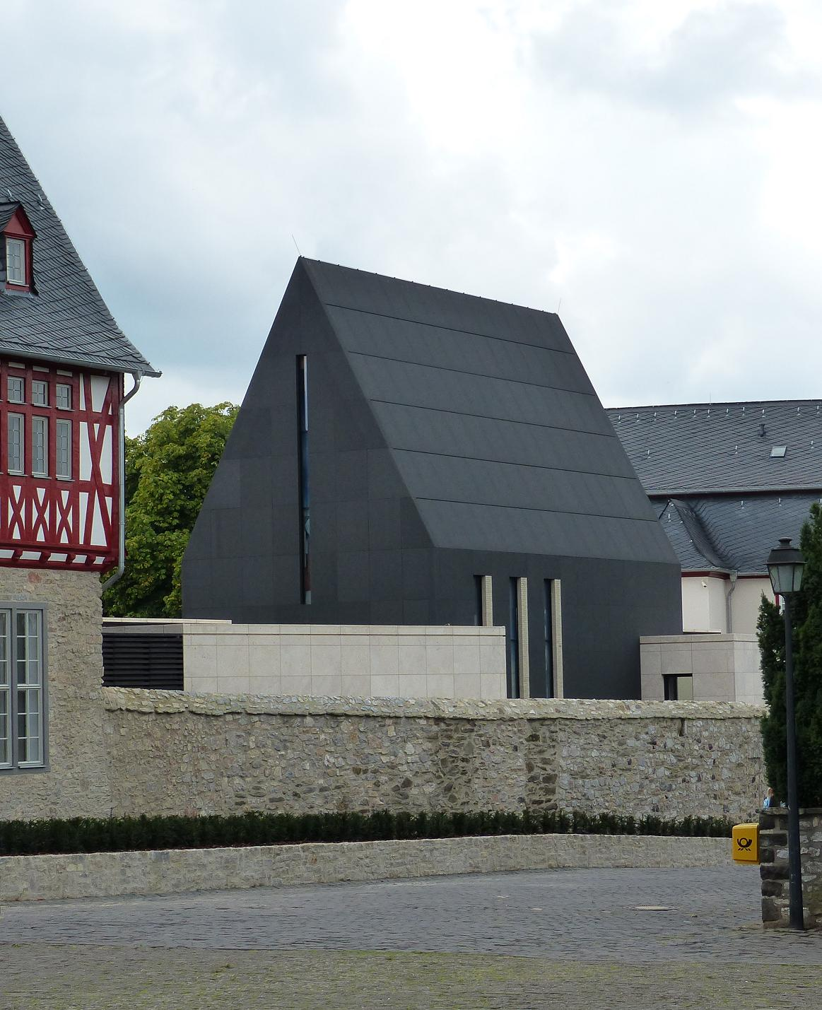 Neue Kapelle am Domplatz in Limburg an der Lahn